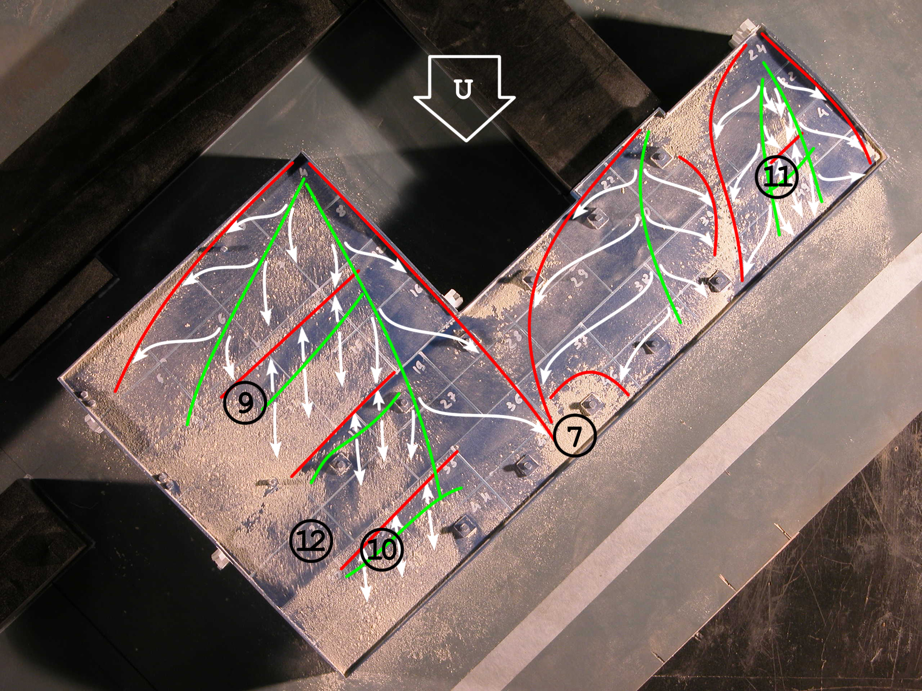 Моделирование распределения снеговой нагрузки